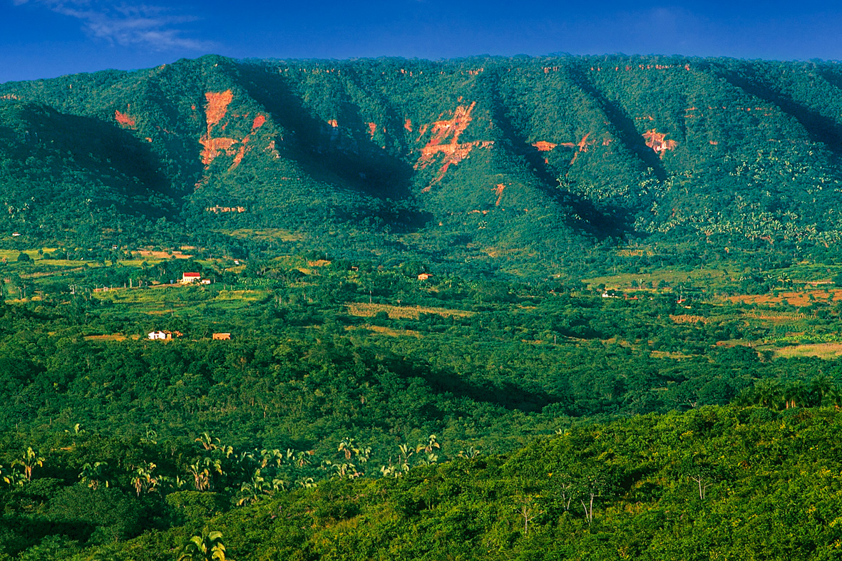 Descrição_para_sua_foto